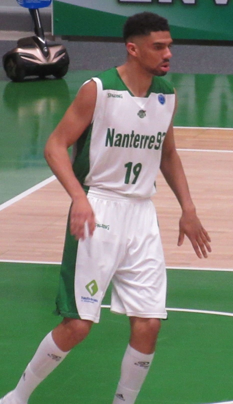 Bathiste Tchouaffé avec le maillot de Nanterre 92